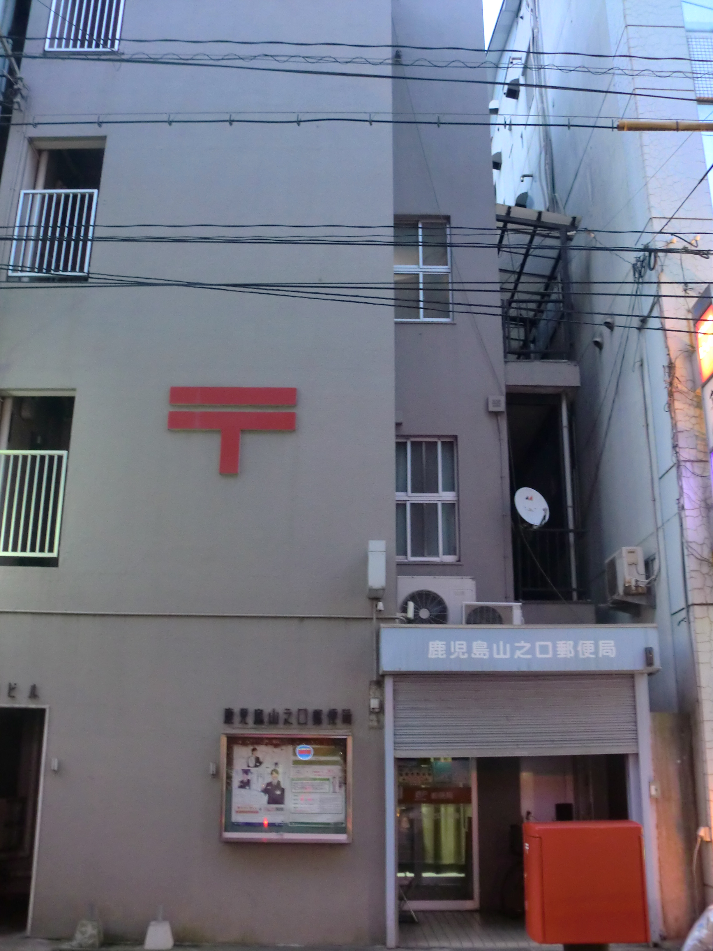 鹿児島市にある鹿児島山之口（かごしまやまのくち）郵便局